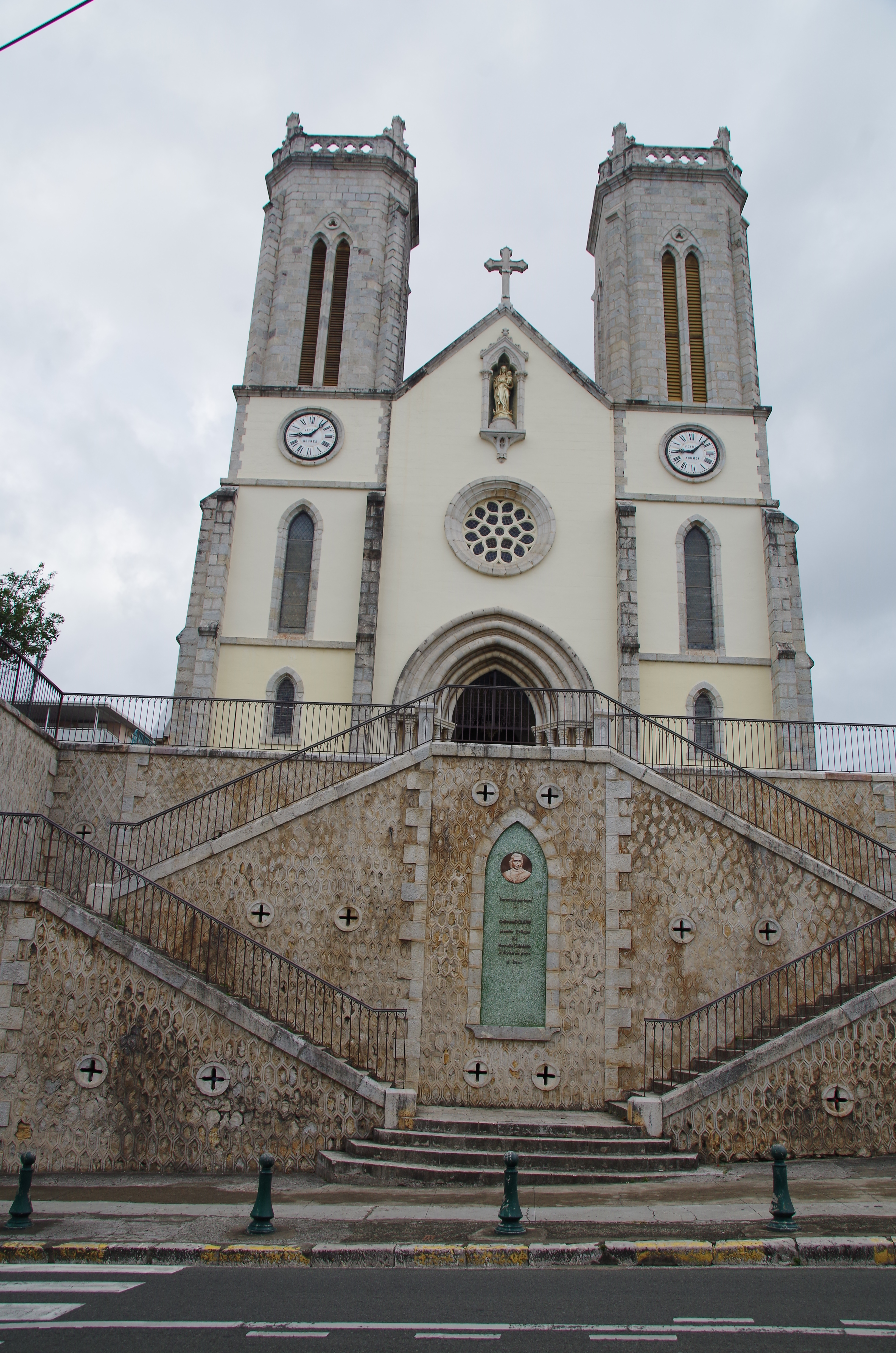 Kathedrale Zugang